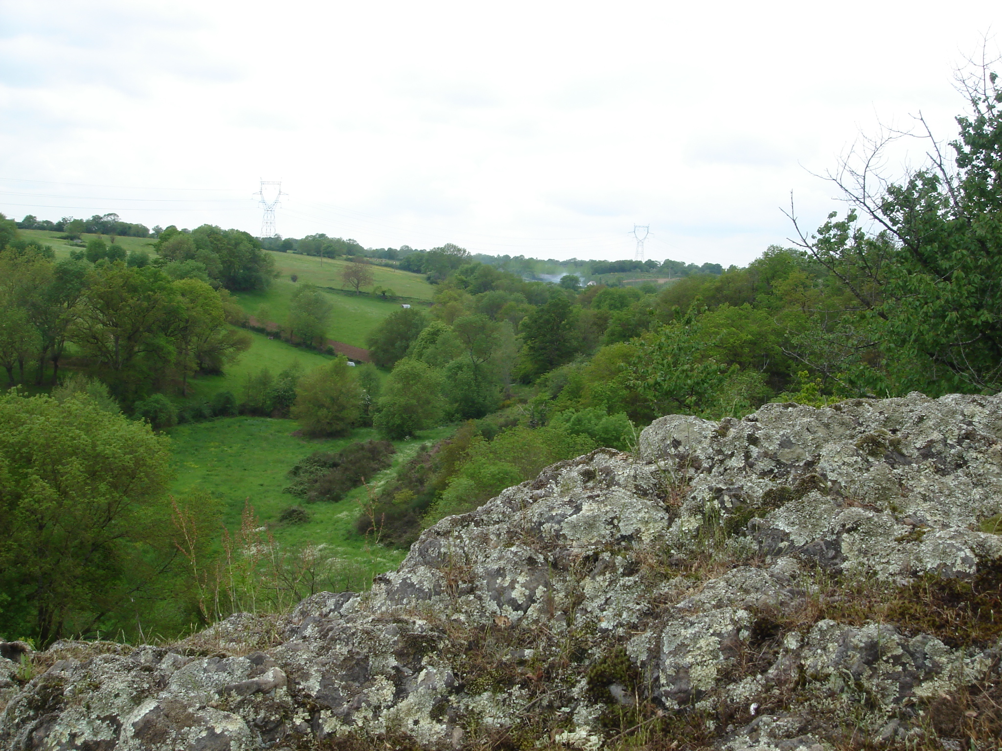 Ancienne vallée du Ruisseau de Bray, à Montrelais, du haut d'un massif de Poudingue